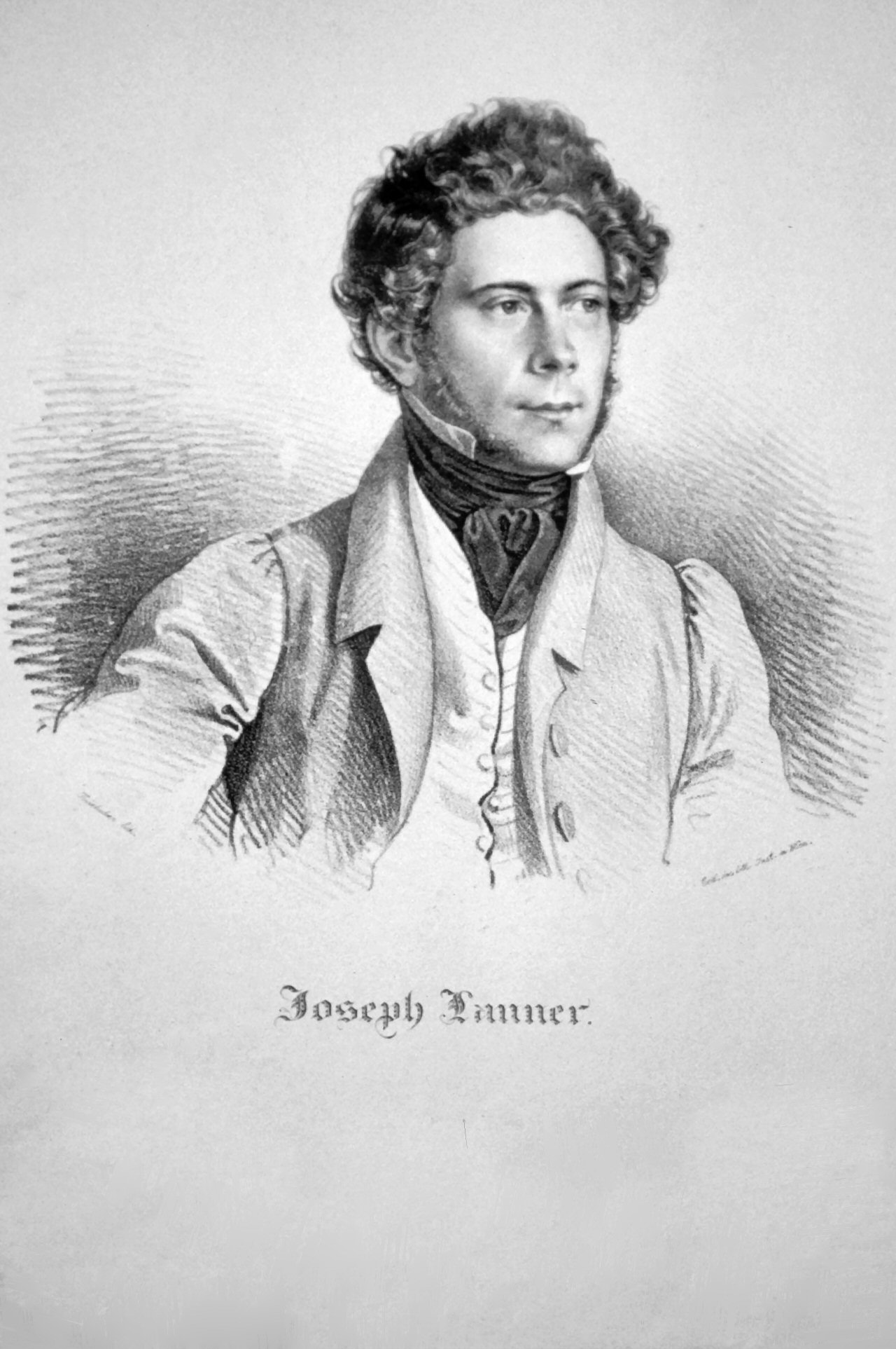 Josef Lanner (1801-1843), österreichischer Komponist und Musiker. Lithographie von Josef Kriehuber, um 1825